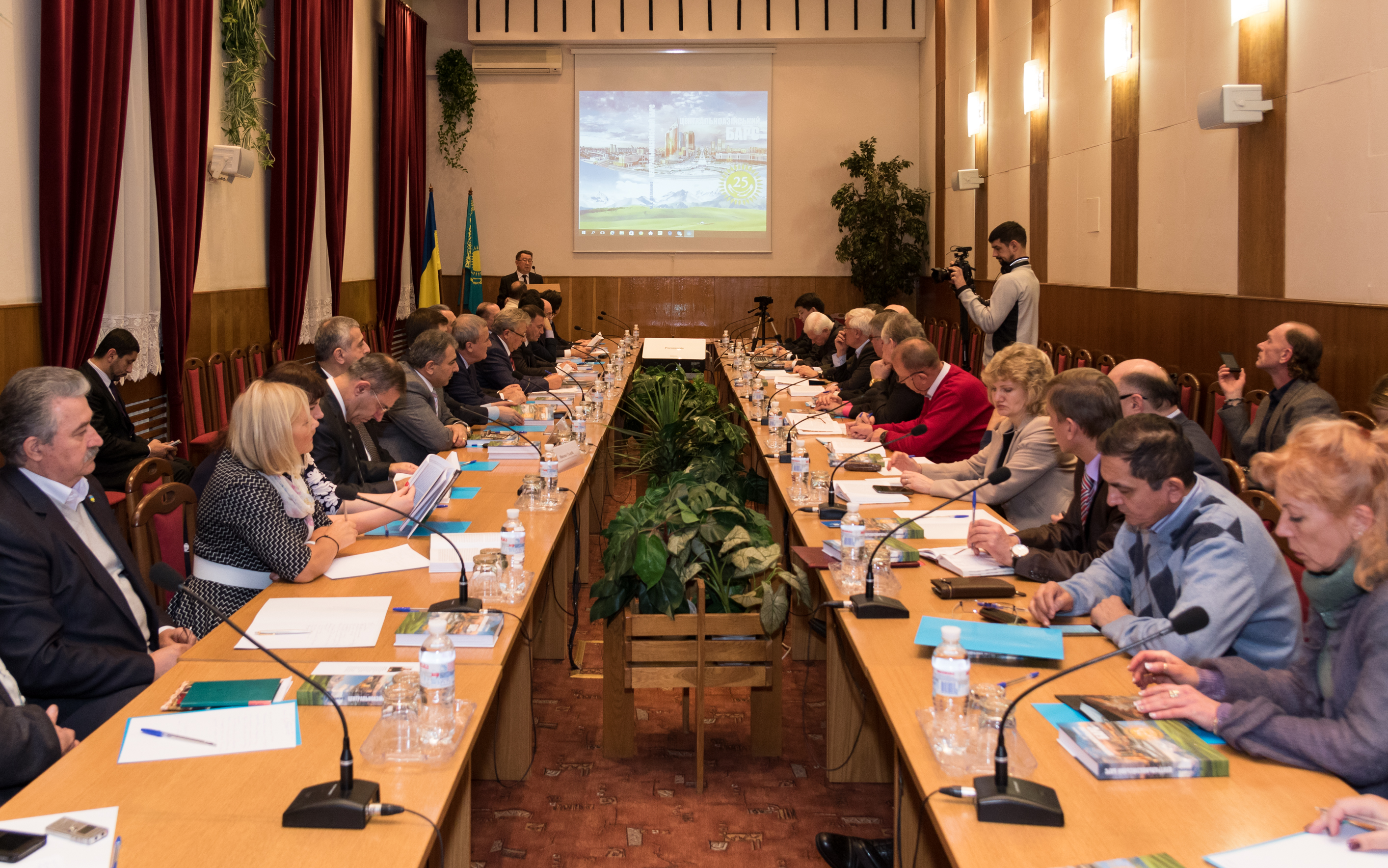 Фотографія обговорення книги.